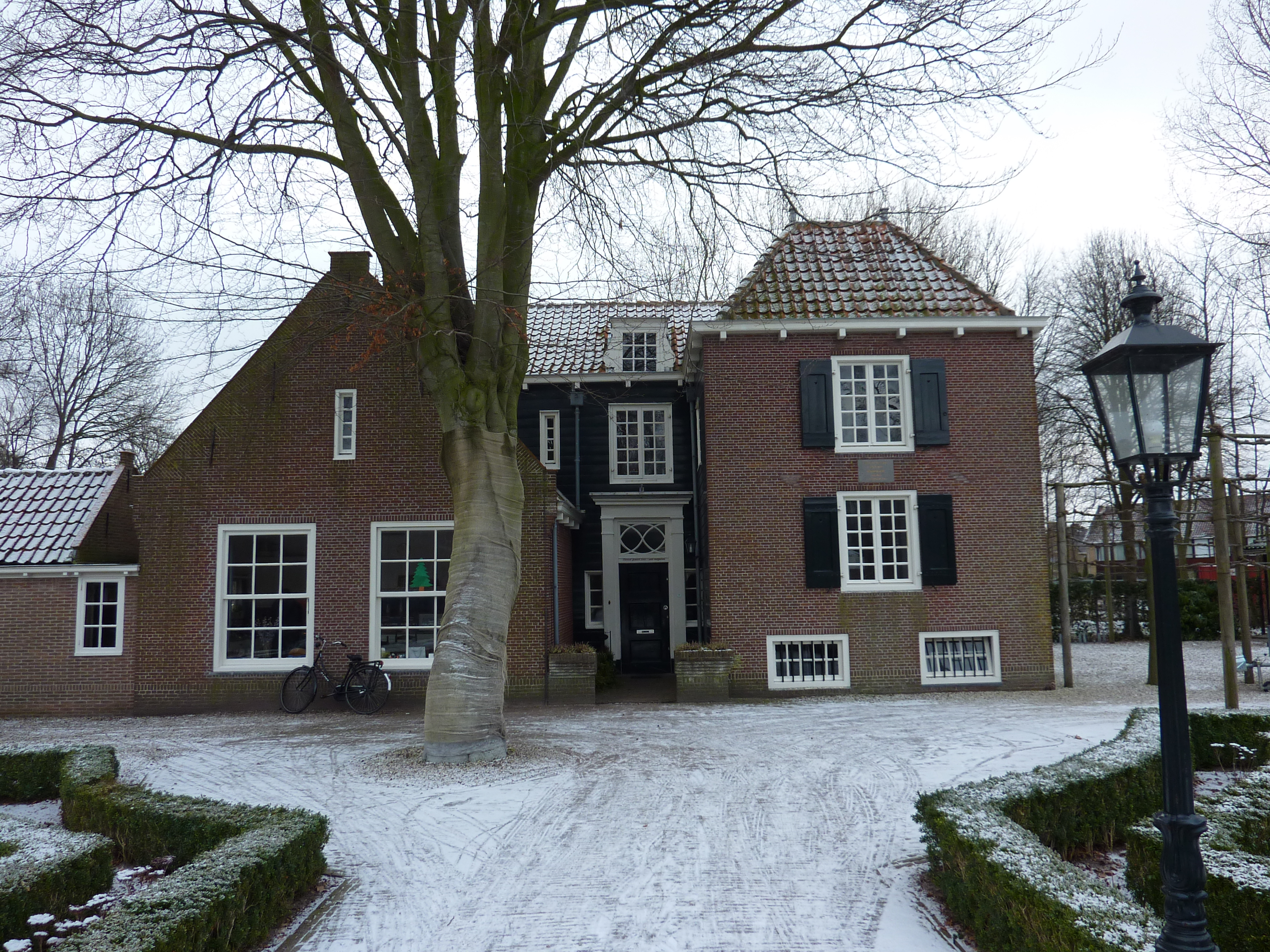 Voorhout, Bloemoord